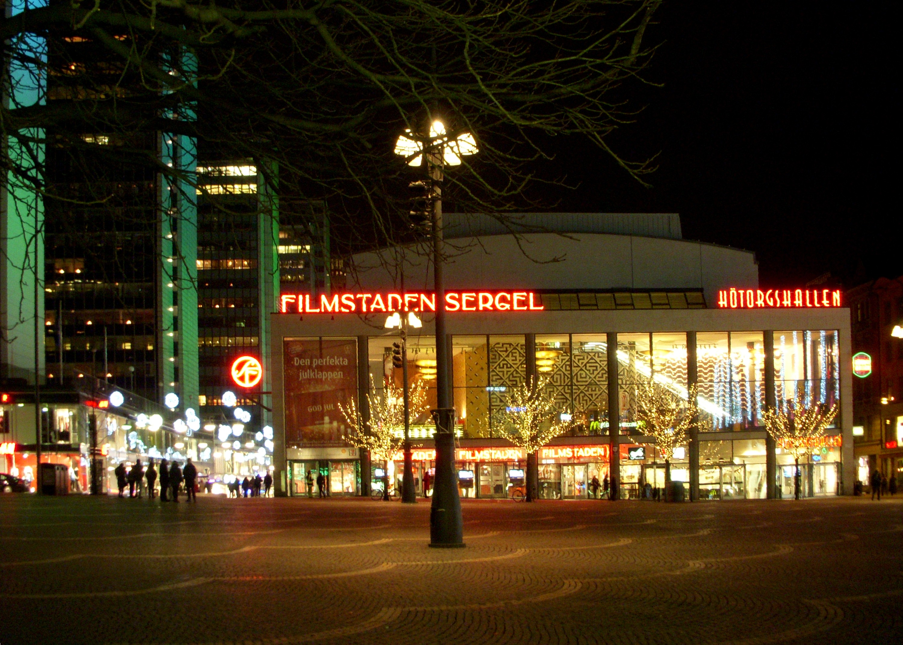 Hötorget och Filmstaden Sergel i Stockholm den 2:a advent 2008